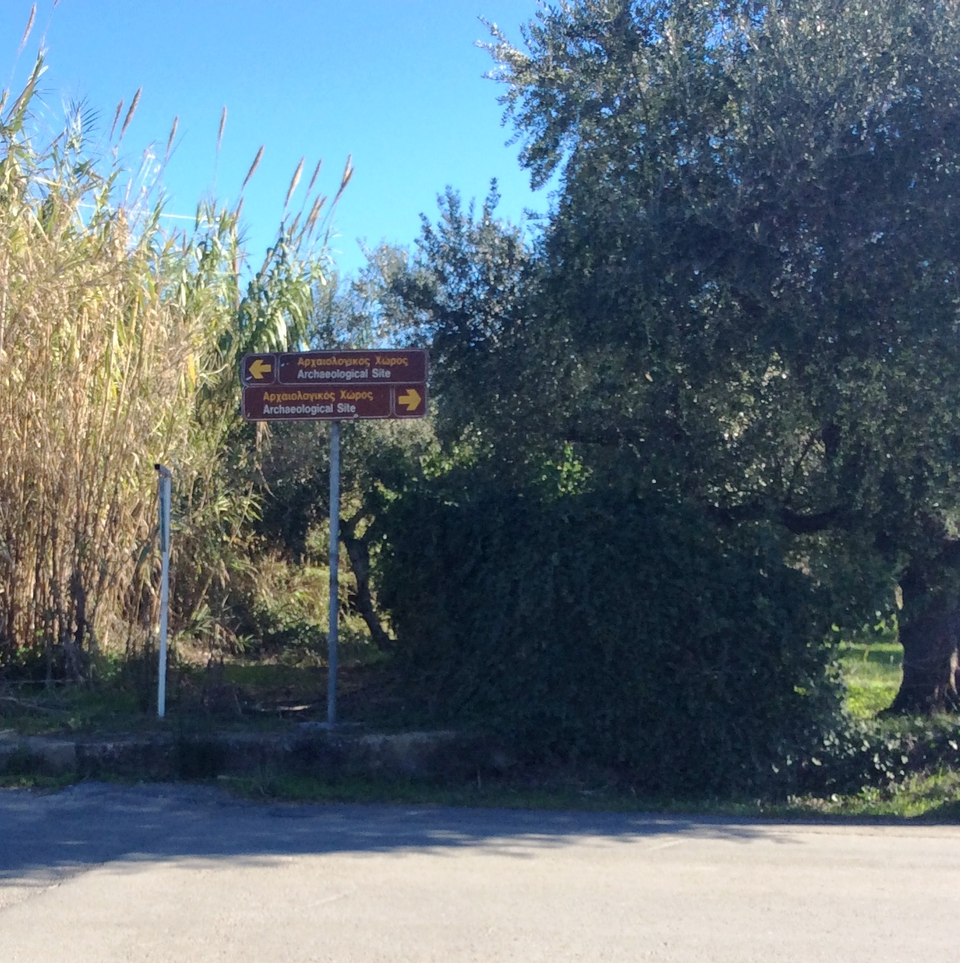 Ρωμανός Μεσσηνίας